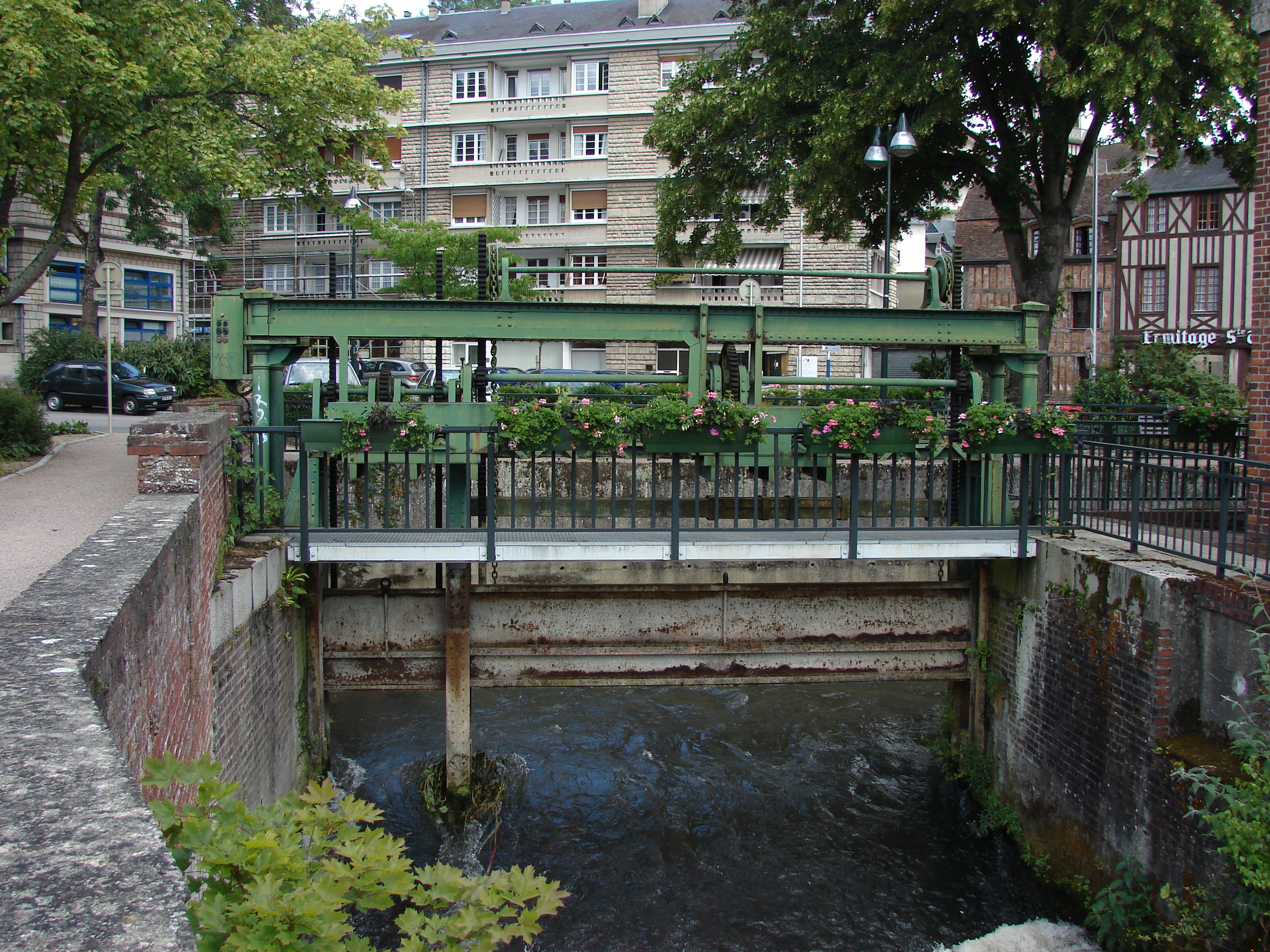 L'orbiquet, Lisieux, Lower Normandy, France